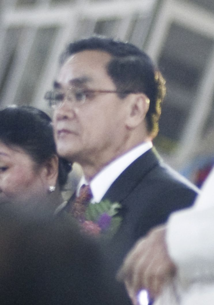 นายกรัฐมนตรี ร่วมพิธีเปิดการแข่งขันกีฬาซีเกมส์ ครั้งที่ 24 ณ นครหลวงเวียงจันทน์ สาธารณรัฐประชาธิปไตยประชาชนลาว 9ธันวาคม2552 (The Official Site of The Prime Minister of Thailand Photo by พีรพัฒน์ วิมลรังครัตน์)